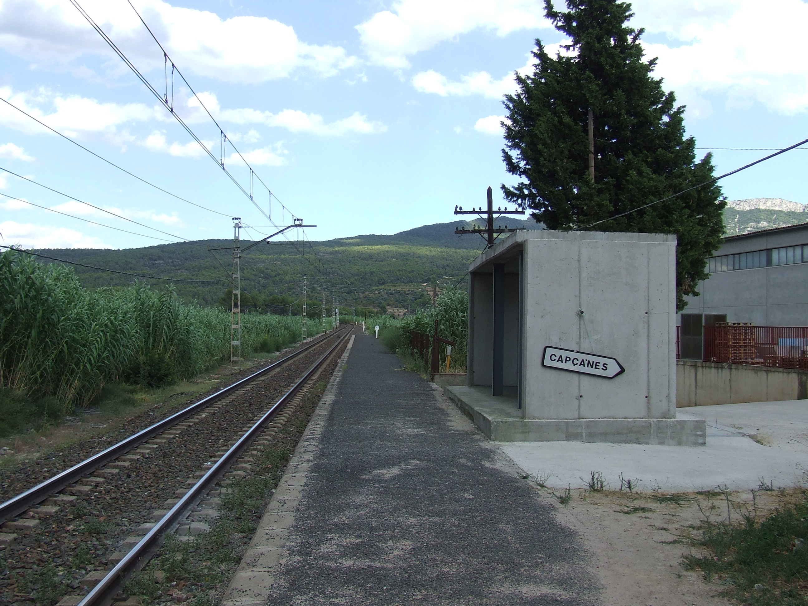 Estació de ferrocarril de Capçanes (el Priorat).